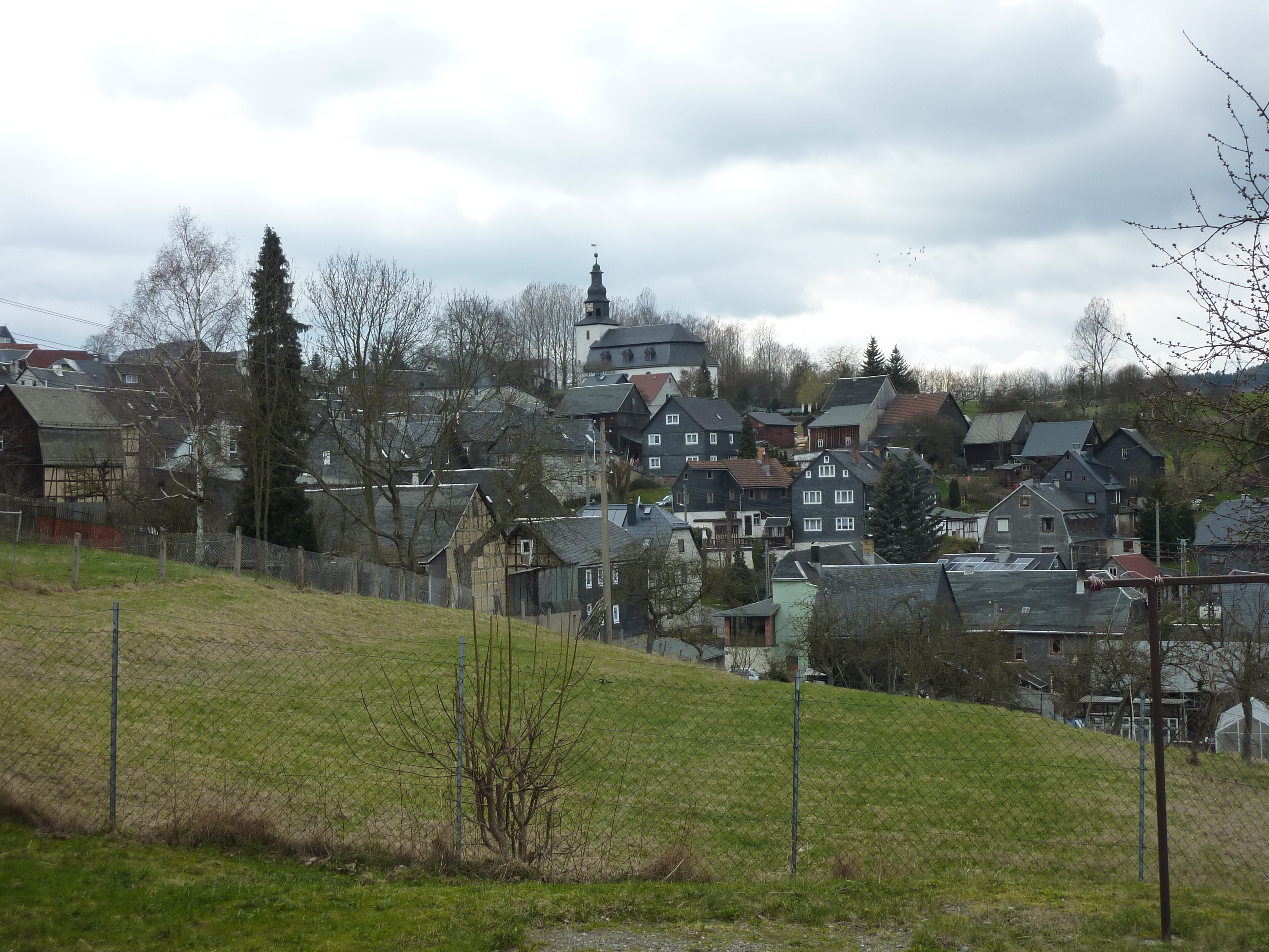 Blick auf einen Teil von Meura mit der Dorfkirche